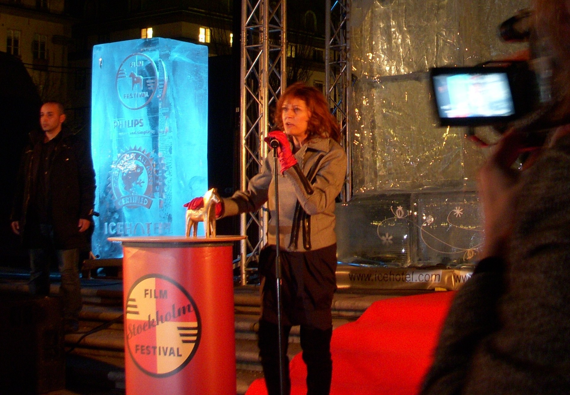 Stockholms filmfestival i Kungsträdgården 21 november 2009, Susan Sarandon